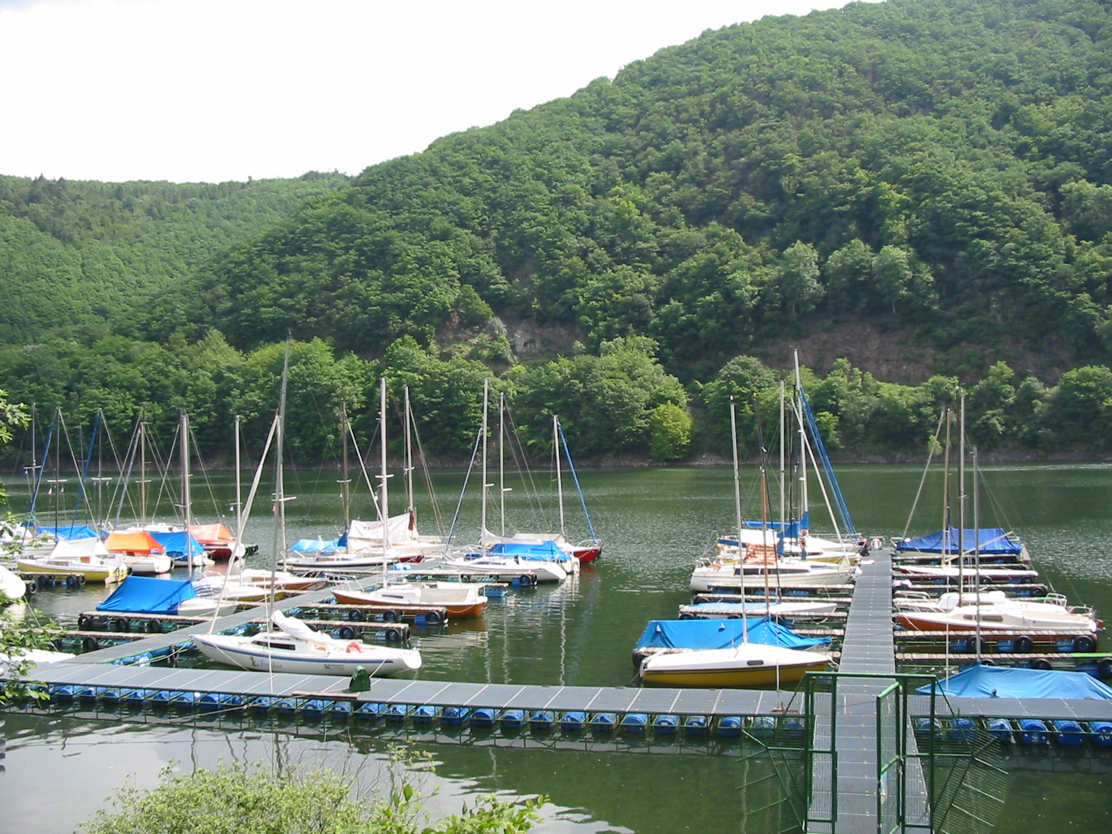 Rurberg, Harbour / Eifel, Germany